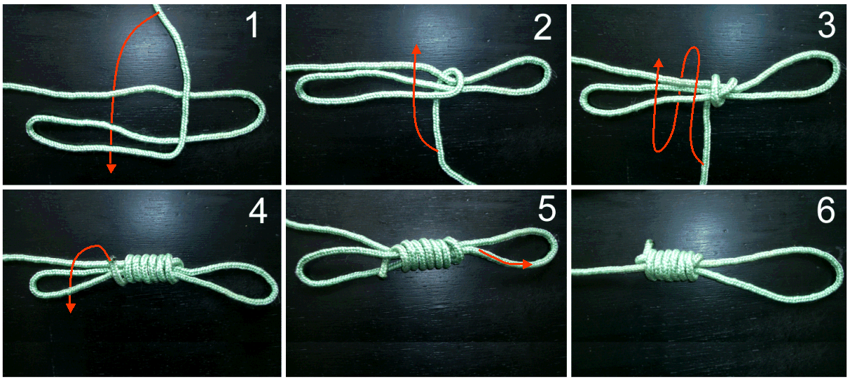 Erstellung eines Henkerknotens